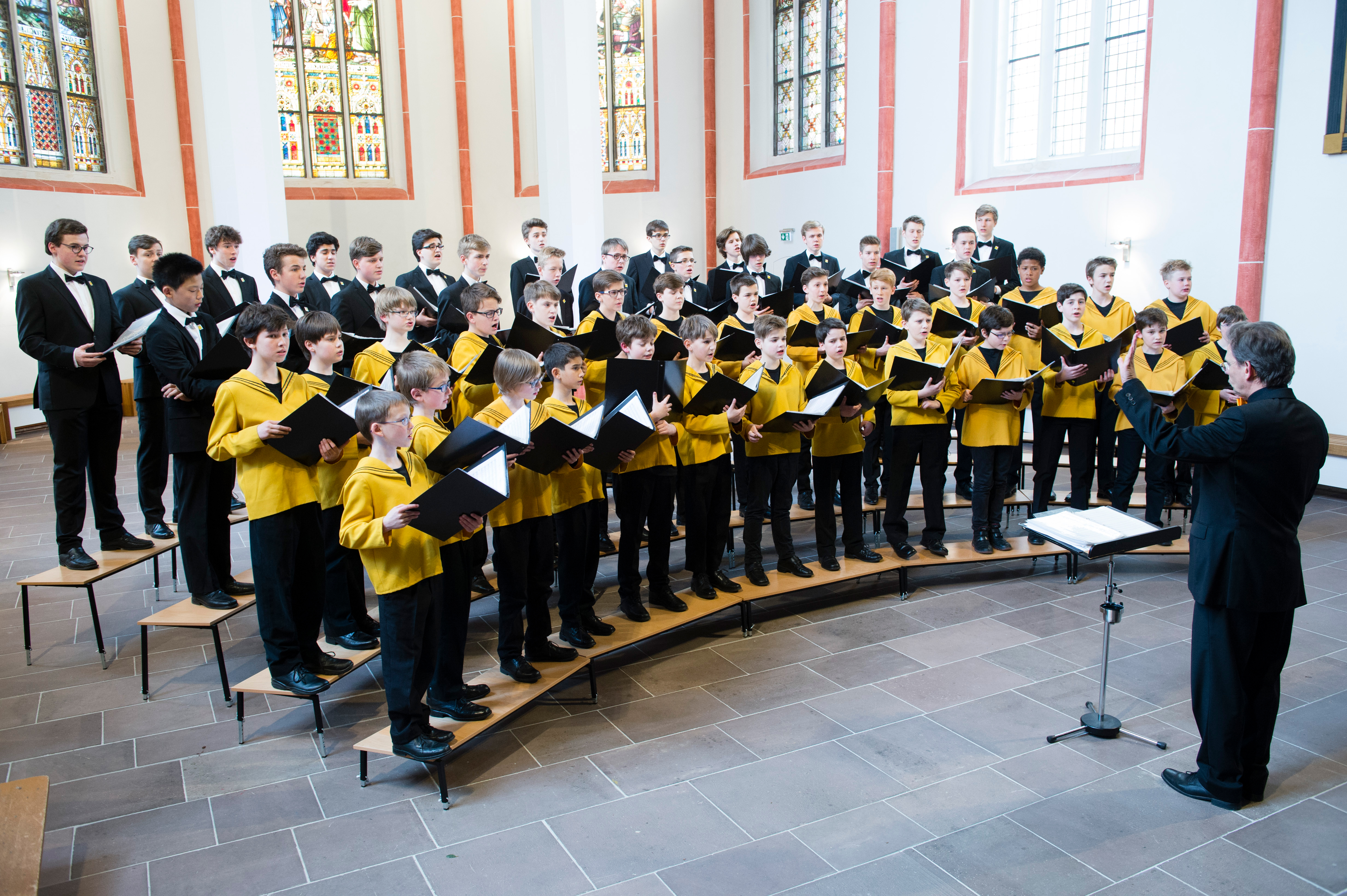 Der Göttinger Knabenchor singt in der St.-Johannis-Kirche in Göttingen (2016)